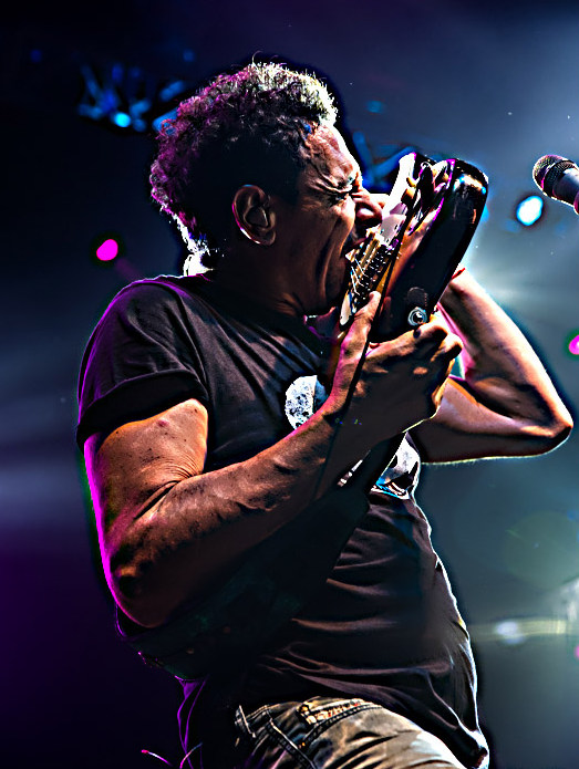 Mollo tocando con sus dientes, Flores, Diciembre de 2016.